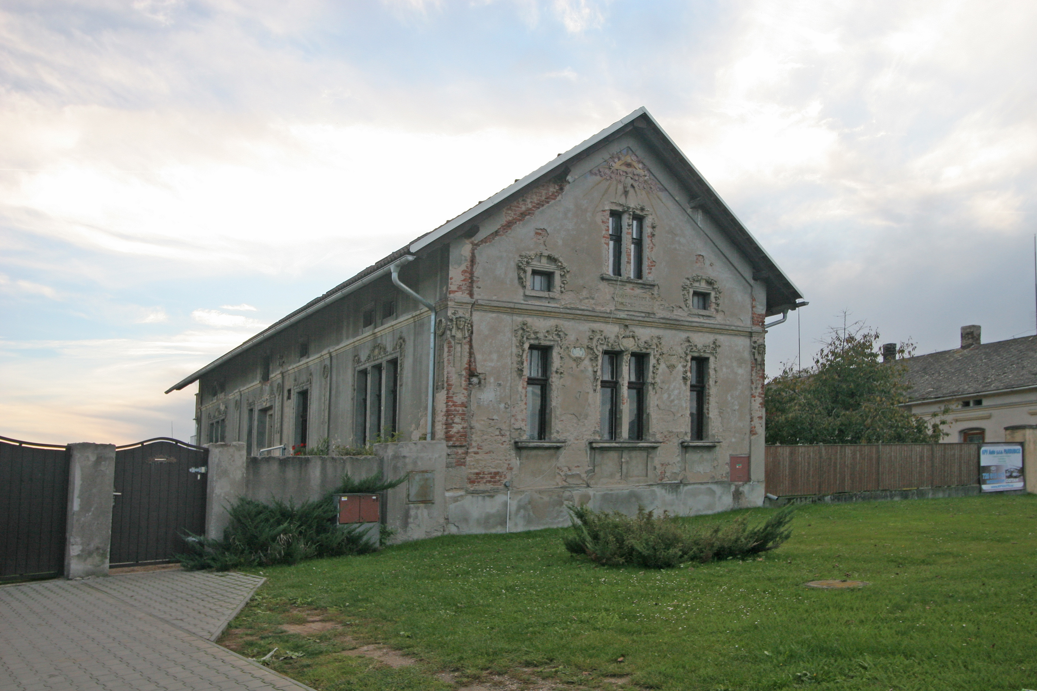 Venkovský dům (Dolany), Dolany 5